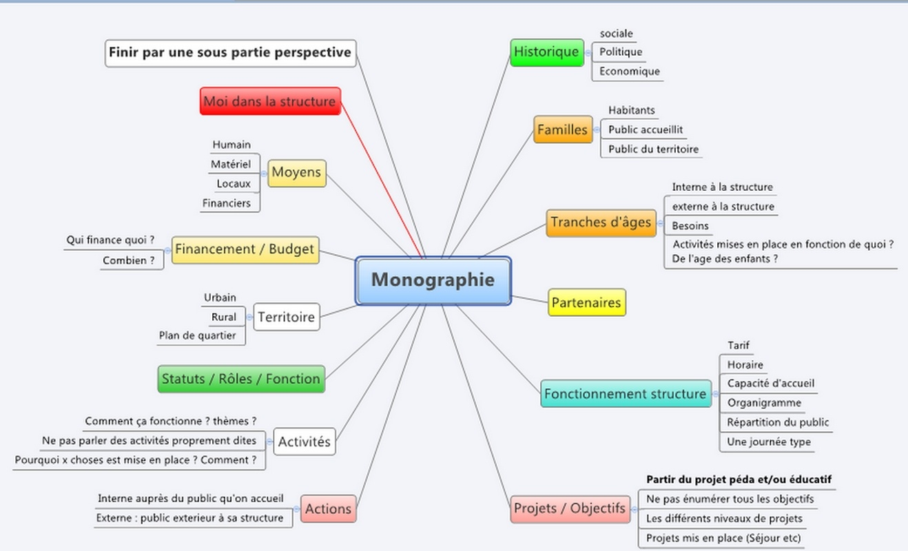 Exemple type de la méthodologie de projet en BPJEPS (dossier d'environs 30 pages)